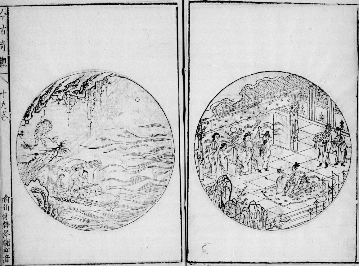 Titre : 今古奇觀 Jin gu qi guan. Merveilles de l'antiquité et des temps modernes. Image de gauche (1/2) : XIX, livre 19 俞伯牙摔琴謝知音 Yu bai ya choai qin xie zhi yin. Le luth brisé. Image de droite (2/2) : XVIII, livre 18 劉元普雙生貴子 Liu yuan pu shuang sheng gui zi. Liu Yuan pu obtient deux beaux enfants. Description : Recueil de 40 contes imprimé par les soins de Bao weng lao ren et de Mo han zhai ; gravé à Wu, au pavillon Bao han (époque des Ming). Préface par Xiao hua zhu ren, de Gu su. Notes en haut des pages ; illustrations soignées, une par nouvelle. Description : Provenant de la bibliothèque de l'Arsenal. Source : Bibliothèque nationale de France, Département des manuscrits, Chinois 4259